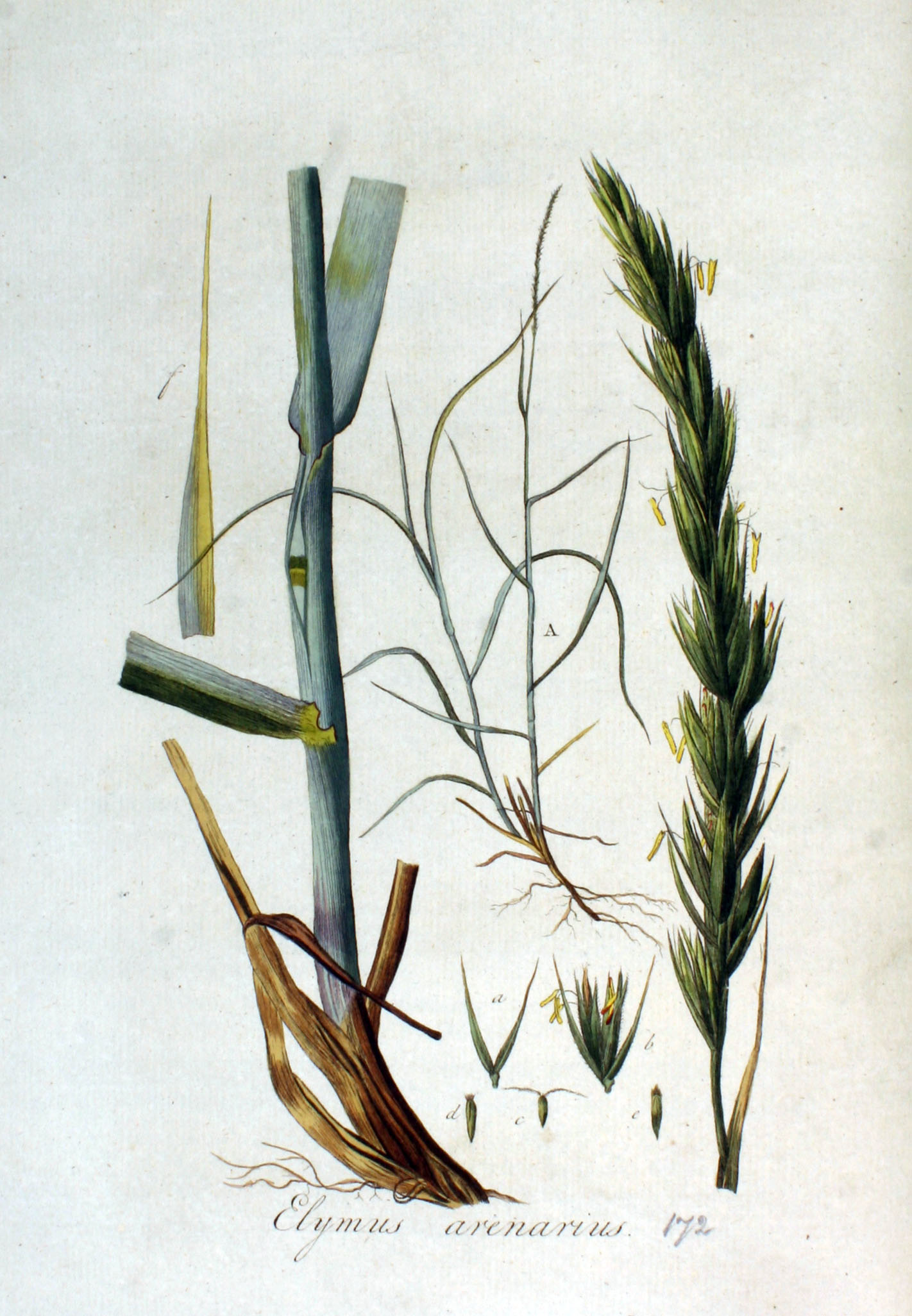 Leymus arenarius (L.) Hochst. (Syn. Elymus arenarius L.)